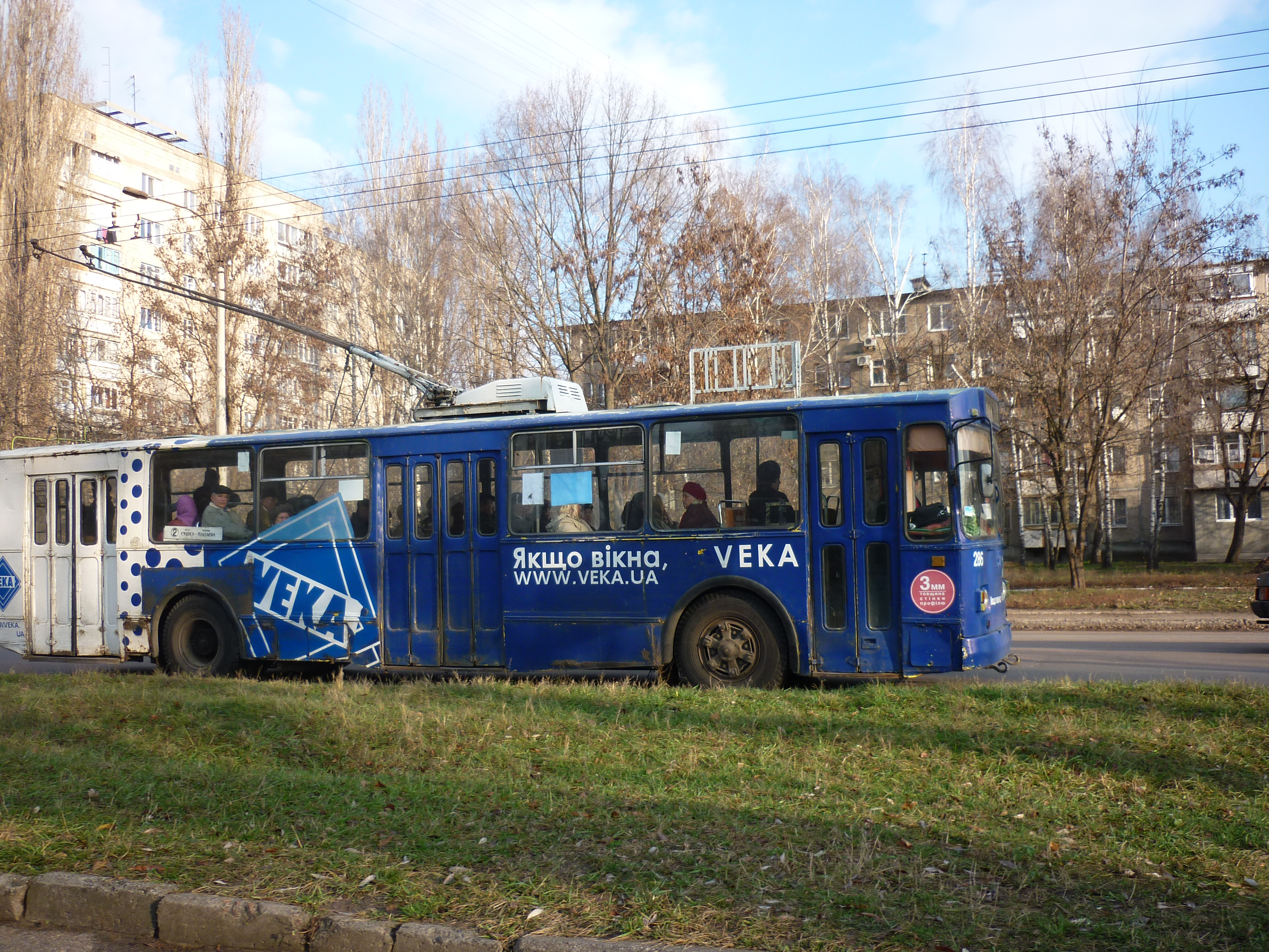 Тролейбус по маршруту №2 на вулиці Ватутіна в Черкасах